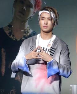 27일 오후 서울시 용산구 한남동 블루스퀘어에서 펜타곤 8번째 미니앨범 'Genie:us ' 발매 기념 쇼케이스가 열려 펜타곤이 개별 포토타임을 갖고 있다.